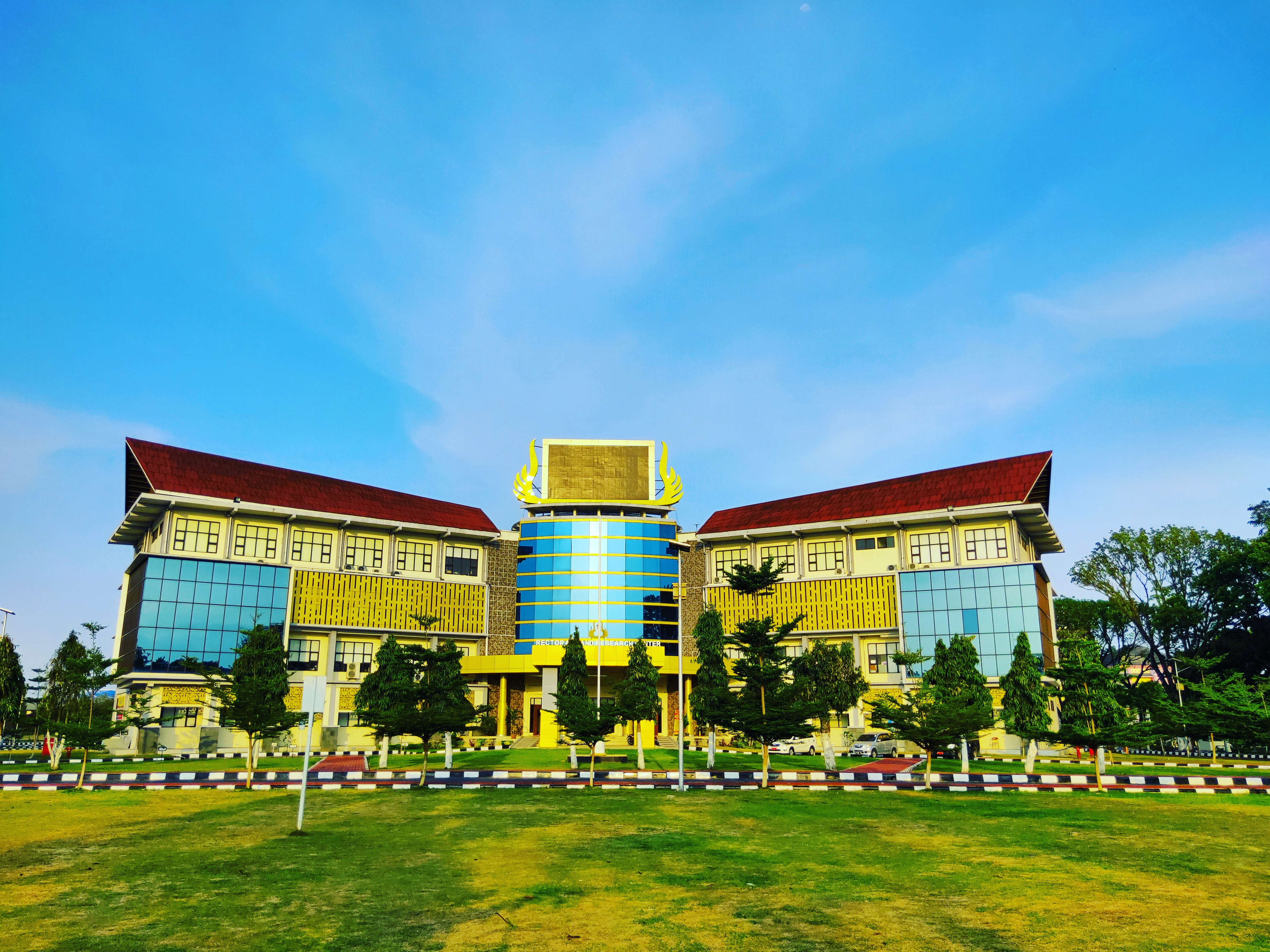 Gedung Rektorat UNP